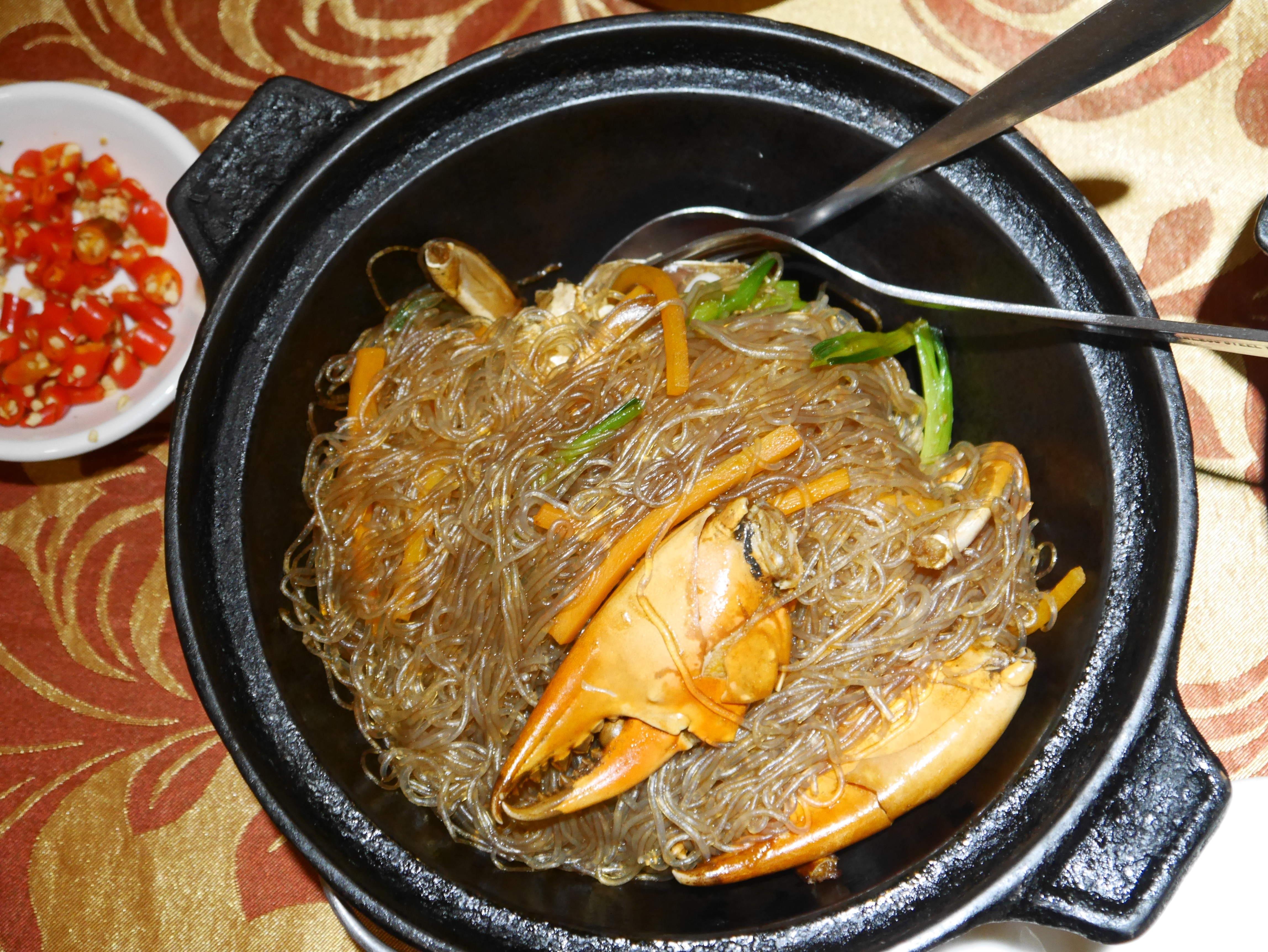 Asiatische Krebs Nudelsuppe